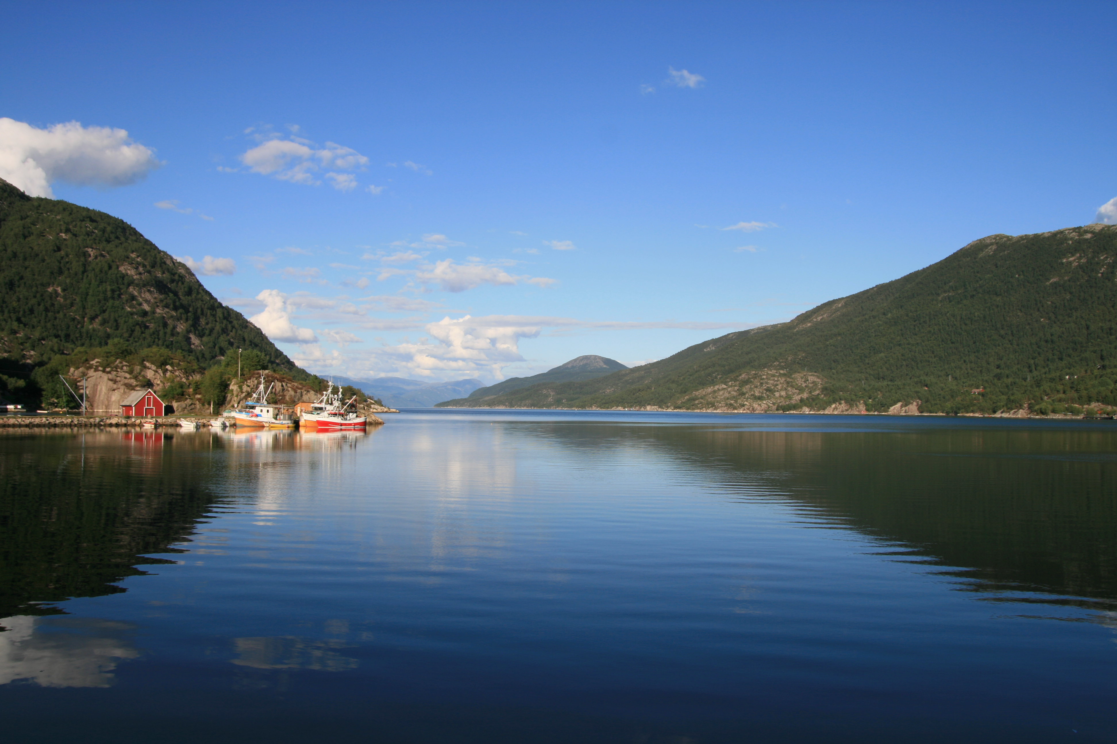 Yrkjefjorden